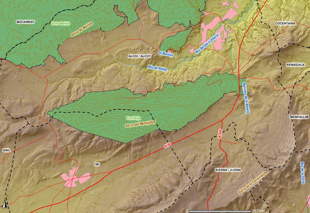 Mapa del Parque Natural Font Roja